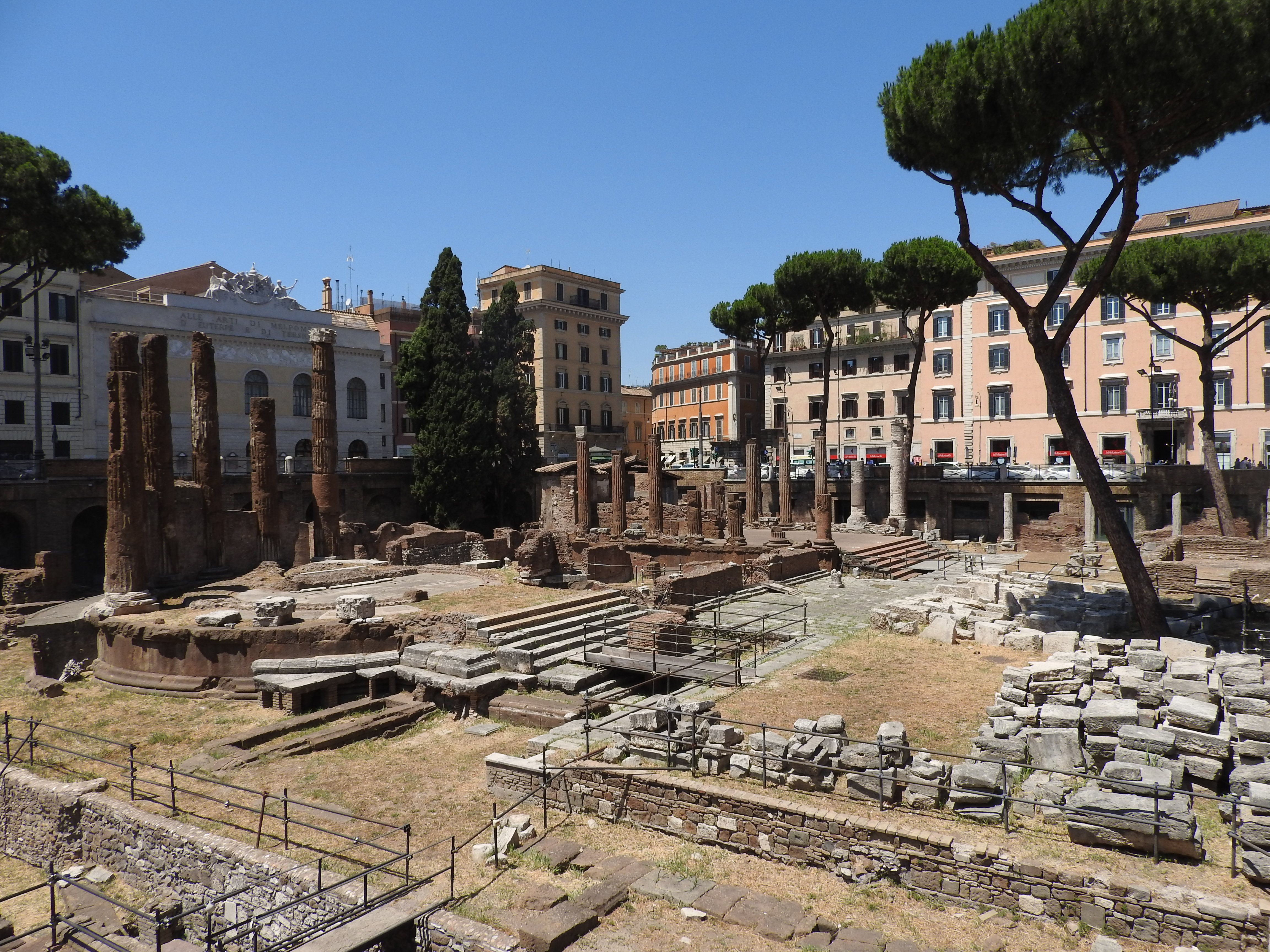 Pompeiuksen kuurian ja Pompeiuksen teatterin jäänteet Roomassa.